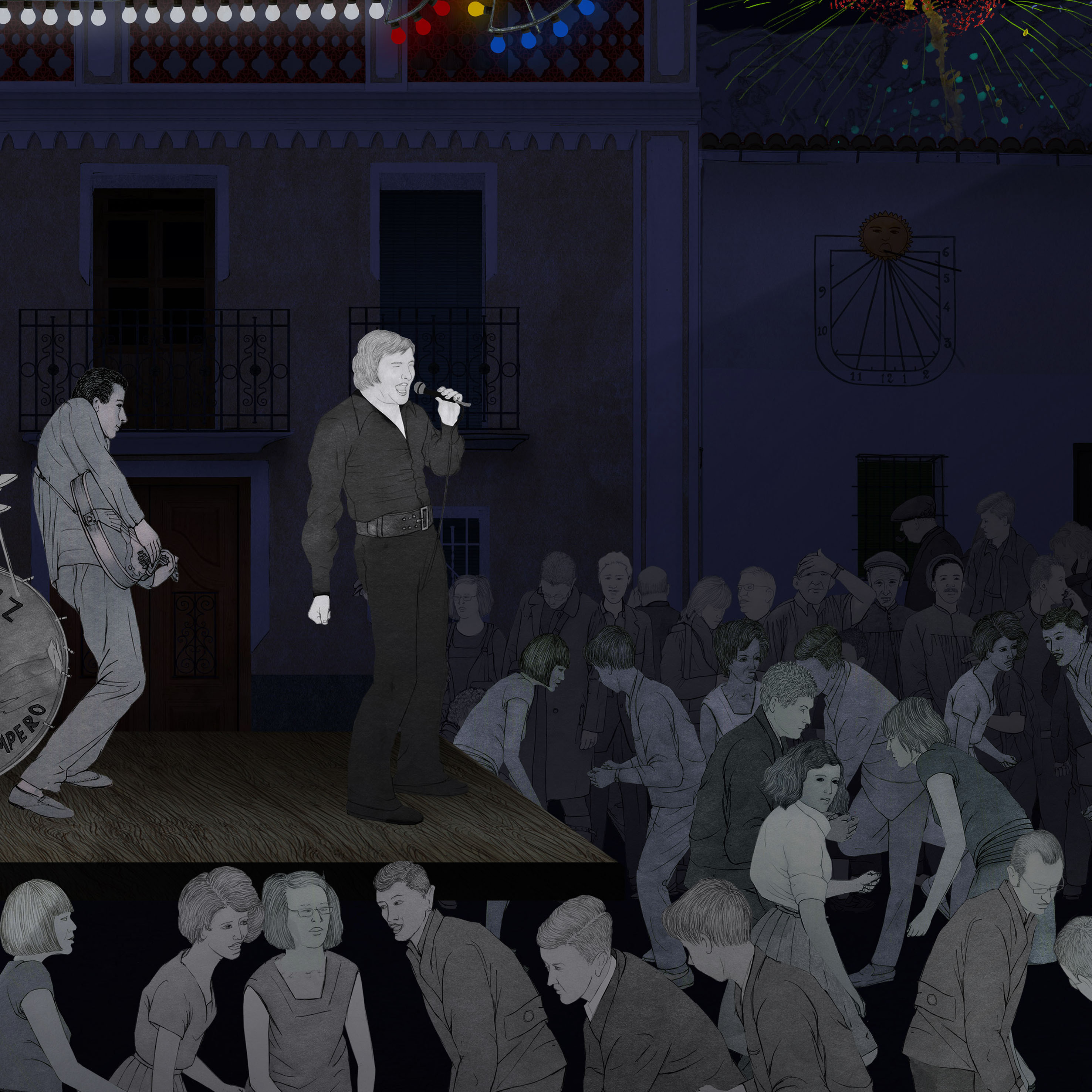 Imatges realitzades pel Museu Valencià d'Etnologia (Andrés Marín Jarque) per al Museu Comarcal de la Vall d'Albaida (Benissoda).